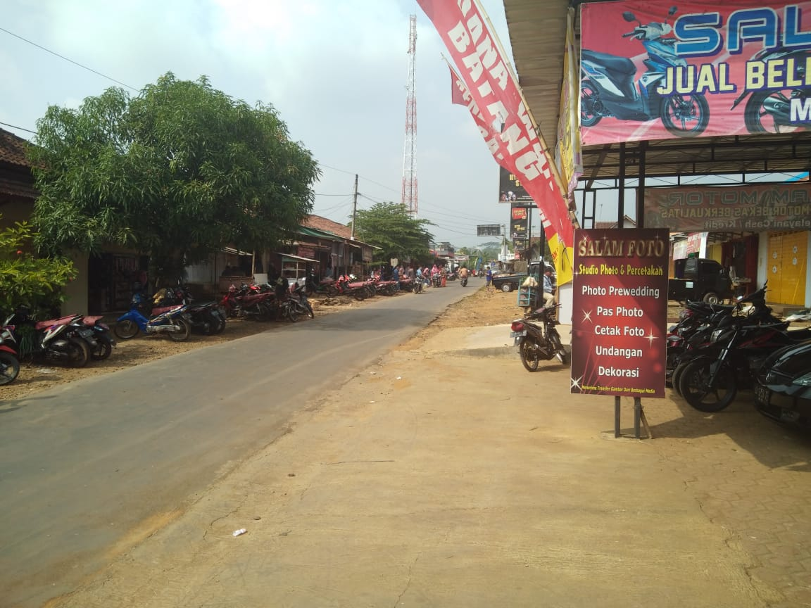 Gambar diambil oleh Hindar Wiyanah